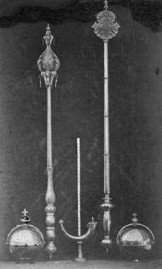 De norske kronregaliene. Septere, salvehorn og rikseplene. Fotografi fra 1881 av O. Væring. Fra Norsk Folkemuseum